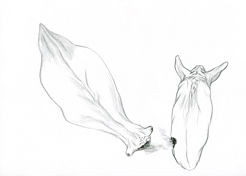 grafitas_ant_popieriaus